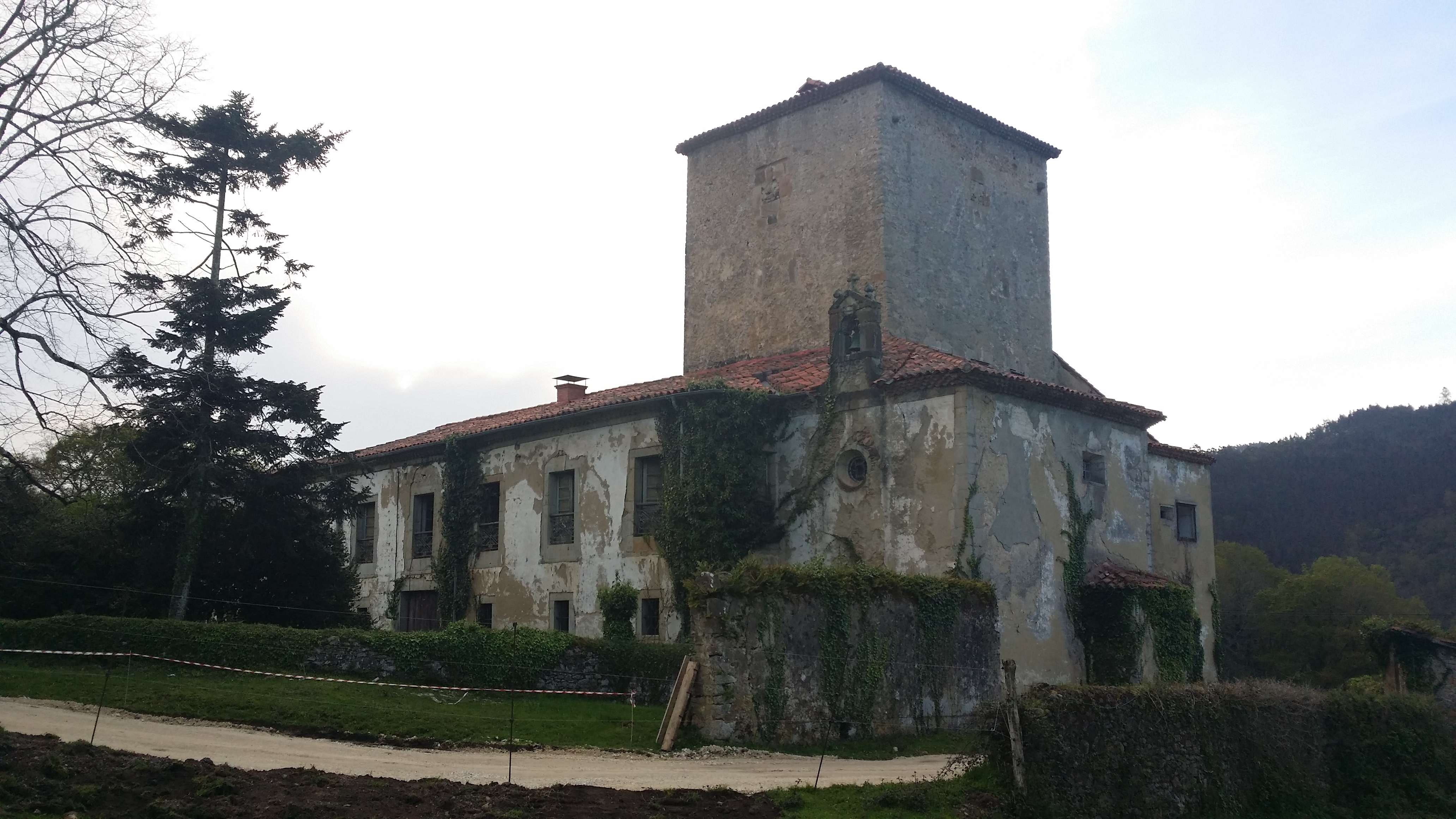 Torre de Arango con la Capilla adosada en primer plano